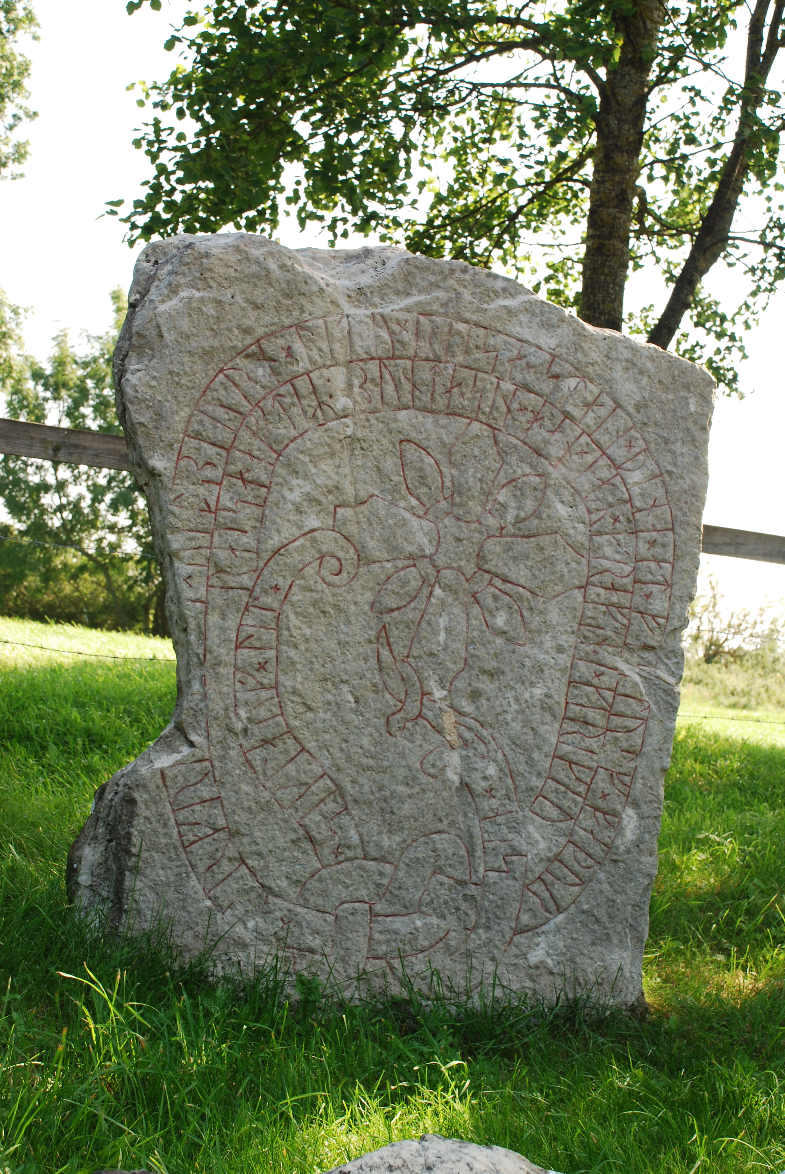 "Härfria och Viabjörn läto resa stenen efter Fastul sin fader; Siglaug lät resa efter sin make. Han är befraven i kyrkan.